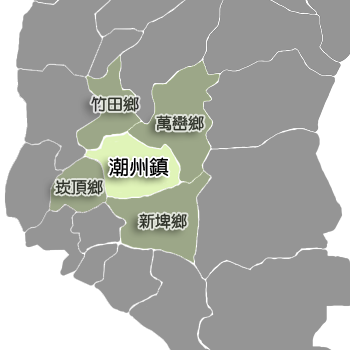 屏東縣潮州鎮相對位置。